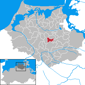 Franzburg in Mecklenburg-Vorpommern - District Nordvorpommern